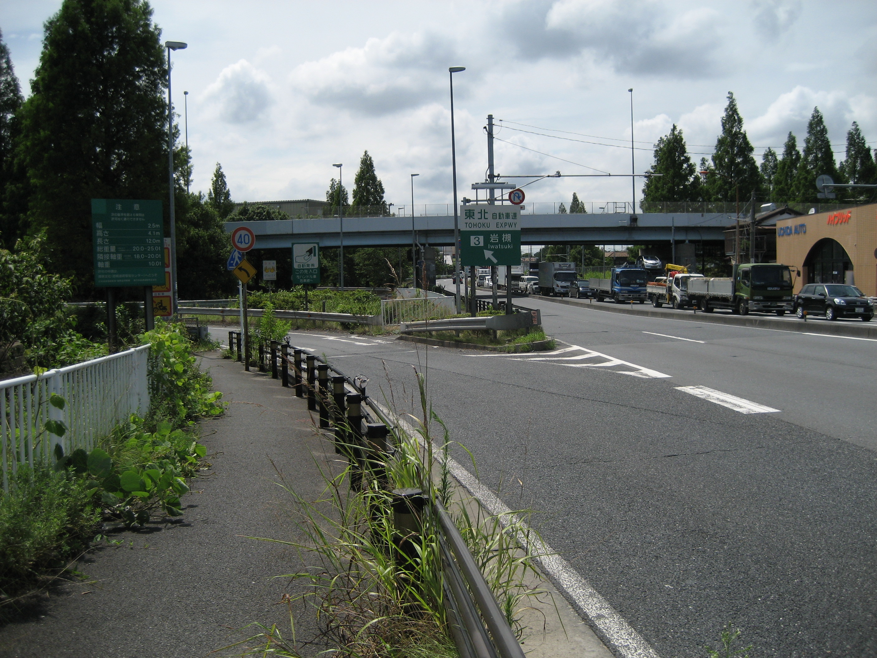 東北自動車道岩槻IC春日部方面側入口